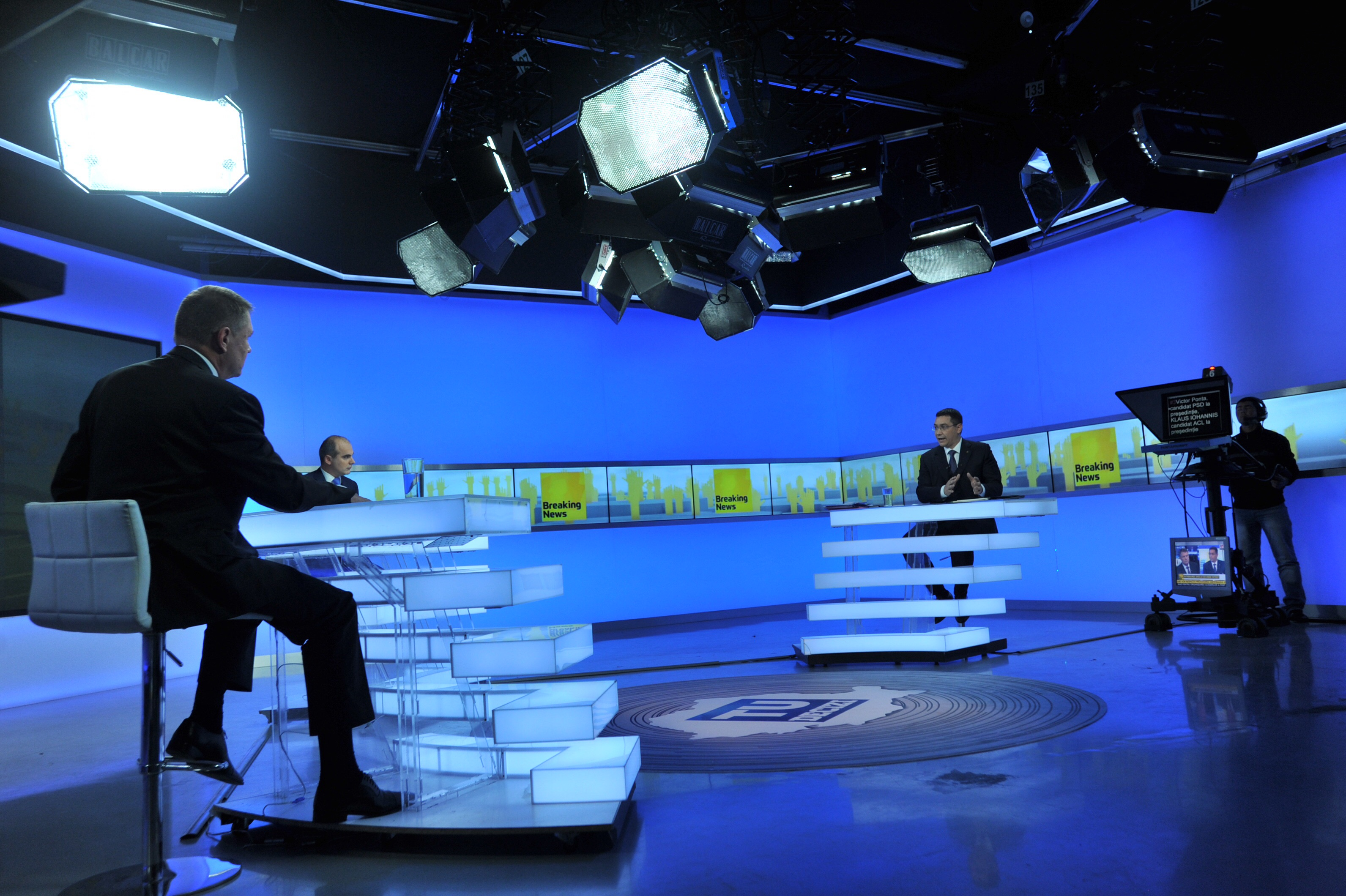 Victor Ponta la dezbatere Realitatea TV - 11.11 (8)